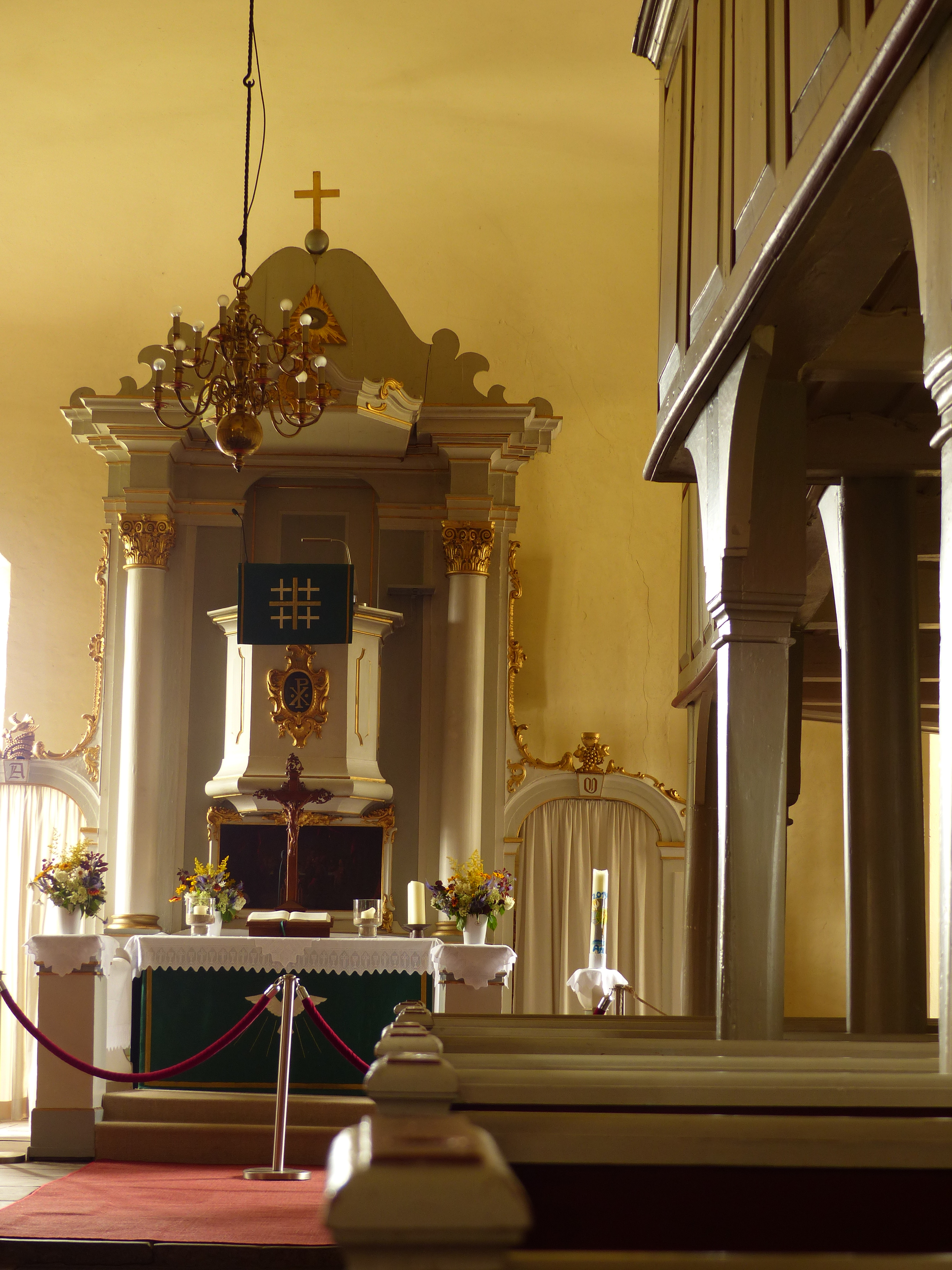 Kanzelaltar der St. Annen-Kirche in Westen